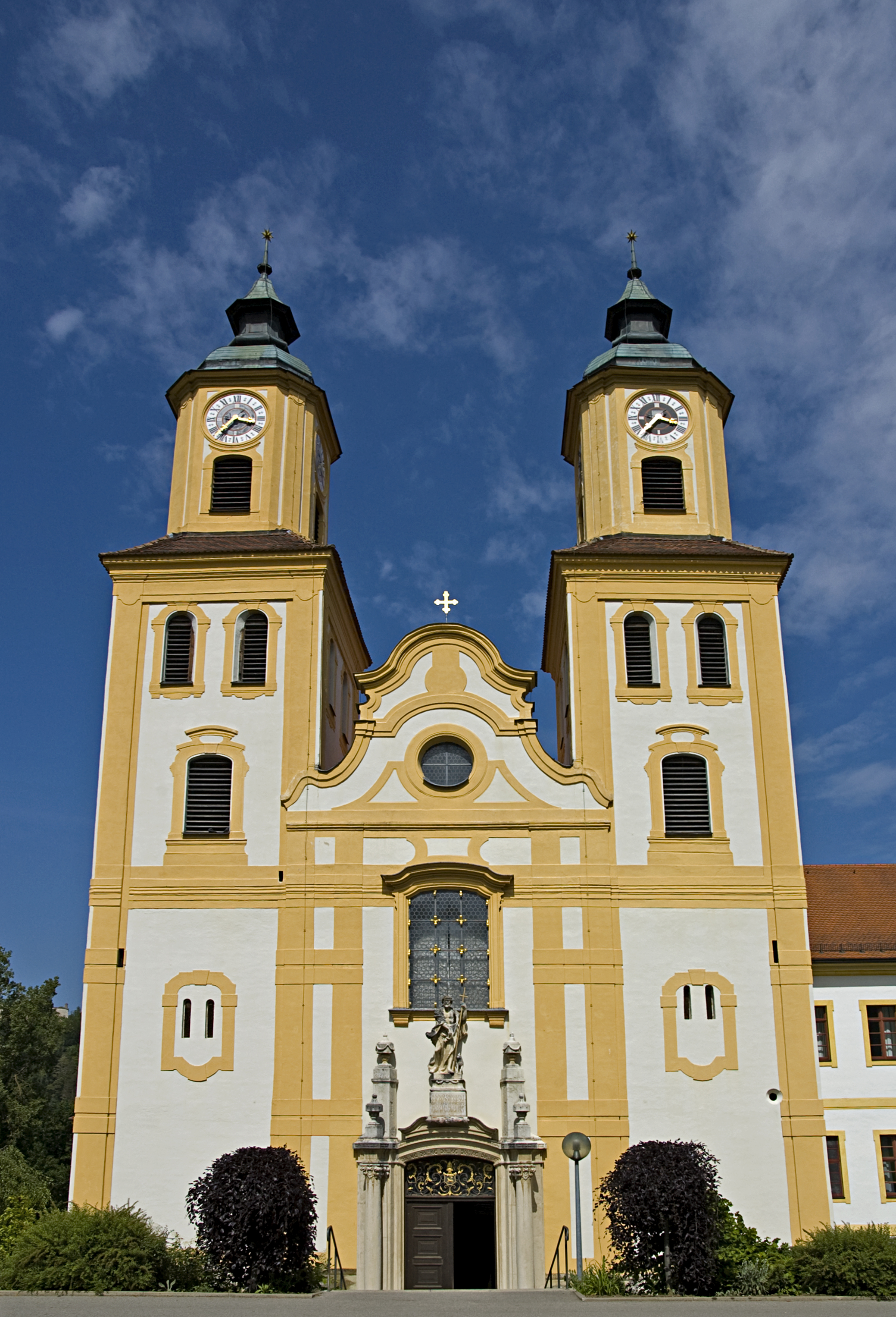 Kloster Rebdorf - Hauptfassade Die Klosteranlage wurde um 1176 vom Eichstätter Bischof Konrad von Morsbach gegründet. Die Klosterkirche ist im Ursprung eine romanische Basilika, die von 1732 - 1734 barockisiert wurde. Heute ist sie Pfarrkirche. Das ehemalige Kloster der Augustiner wurde im Stil des Barock erbaut.This is a photograph of an architectural monument.